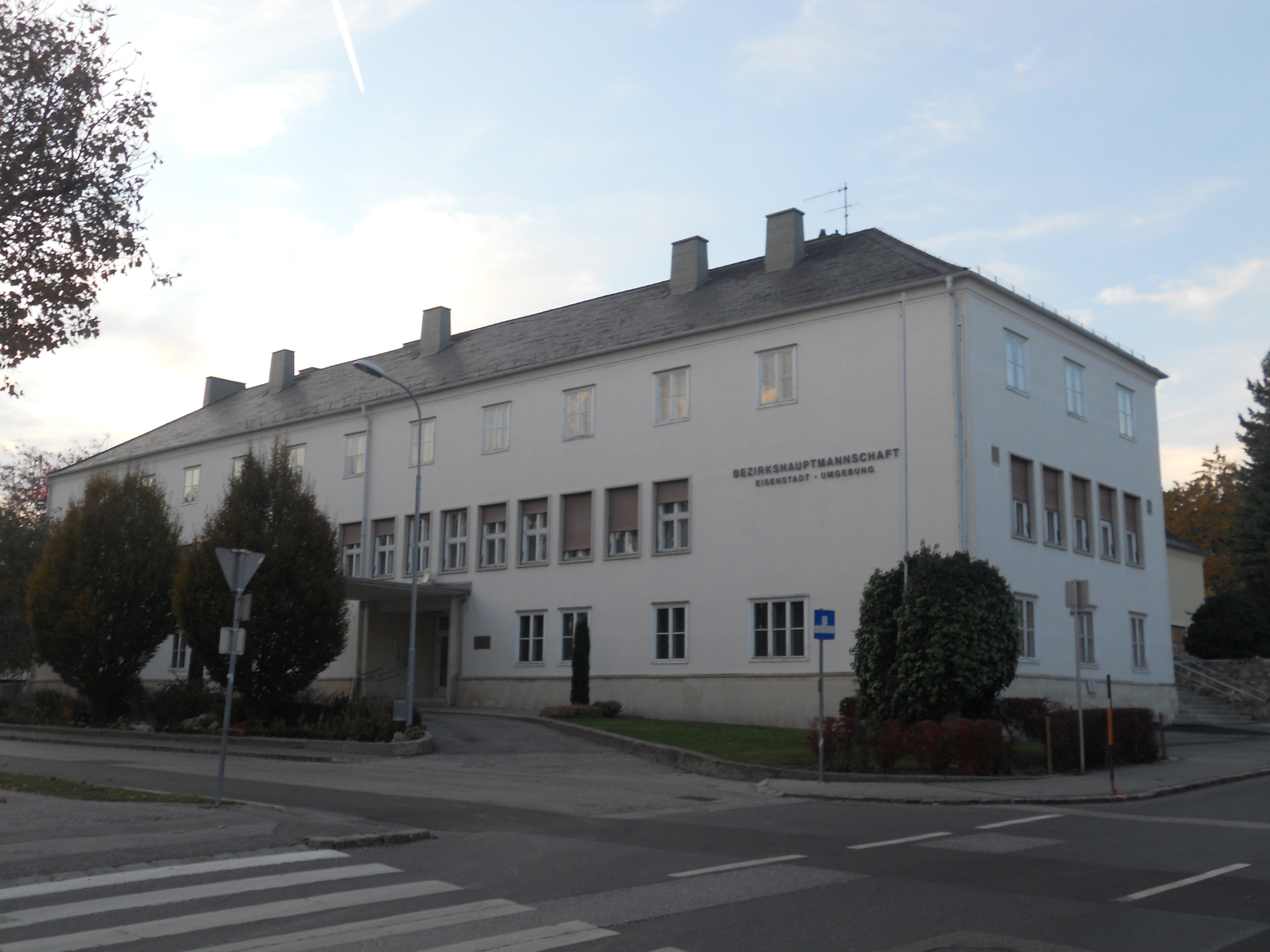 BH Eisenstadt-Umgebung, ehem. Kammer d. gewerbl. Wirtschaft f. d. Bgld.